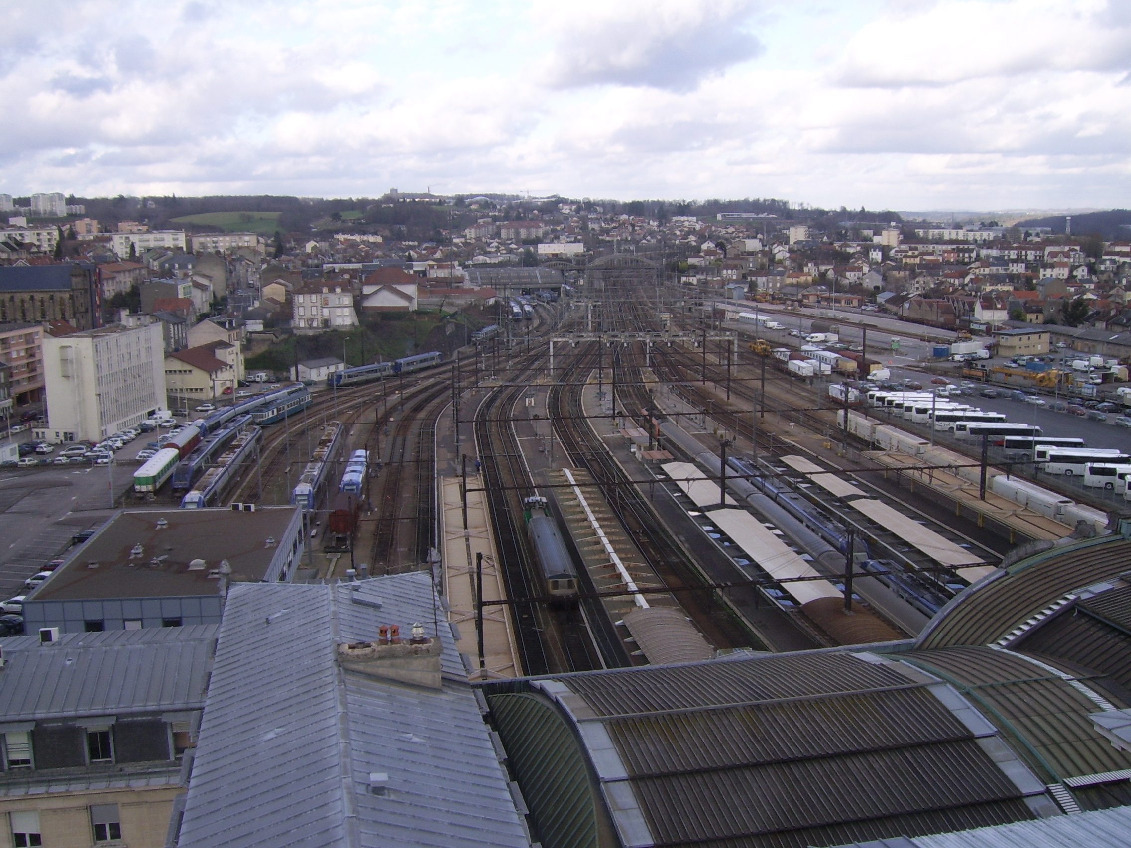 Voies ferrées, gare des Bénédictins, Limoges, direction Paris.